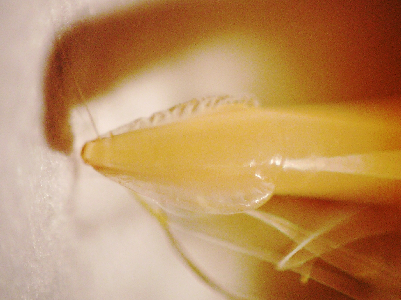 Toxocara cati, Glista kocia, Białowieża, Polska